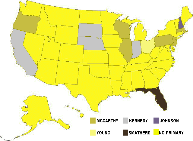 1968 Democratic presidential primaries